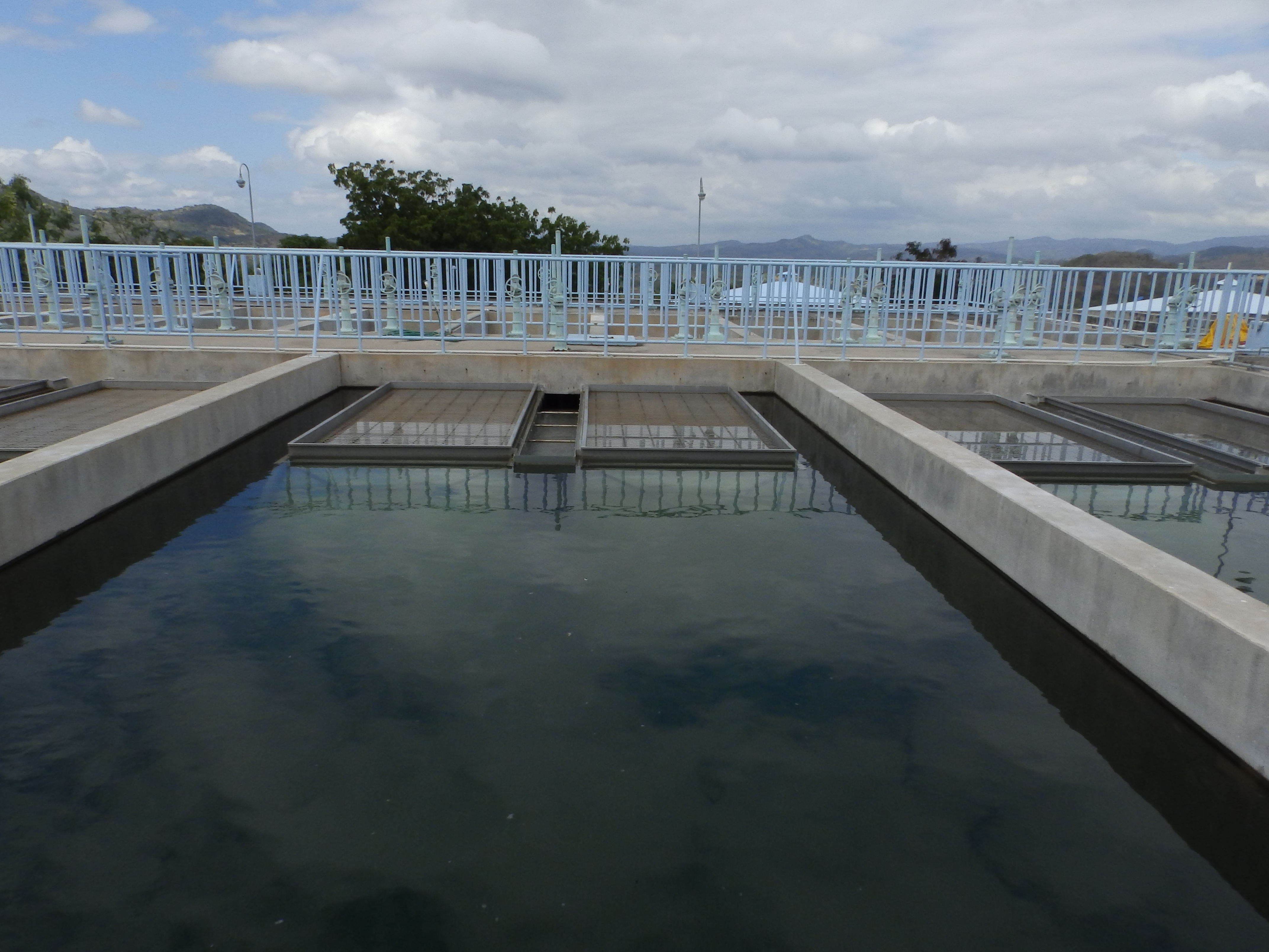 Sedimentadores, PTAP, Juigalpa, Nicaragua